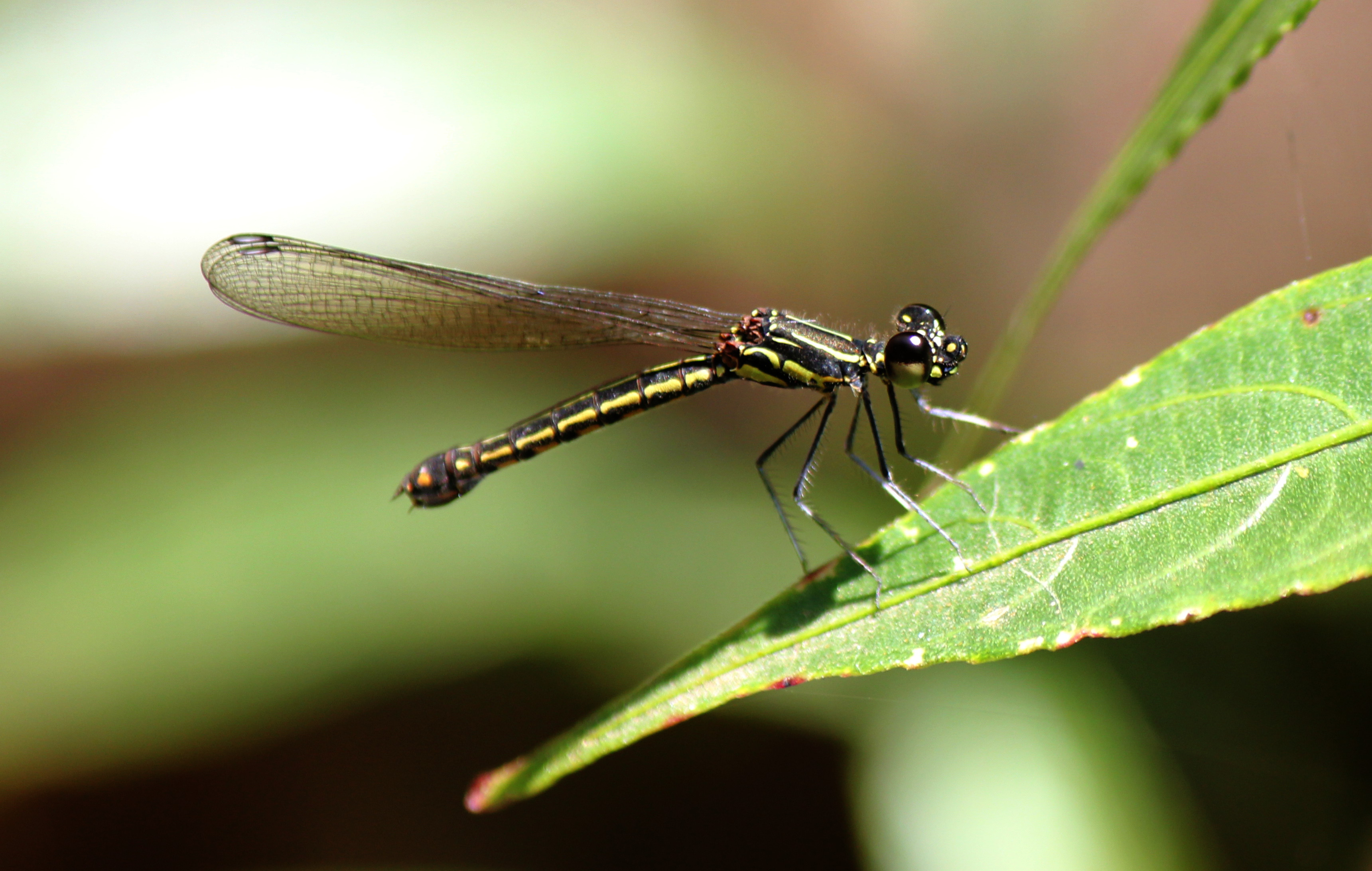 Own work of Buddhika Mawella